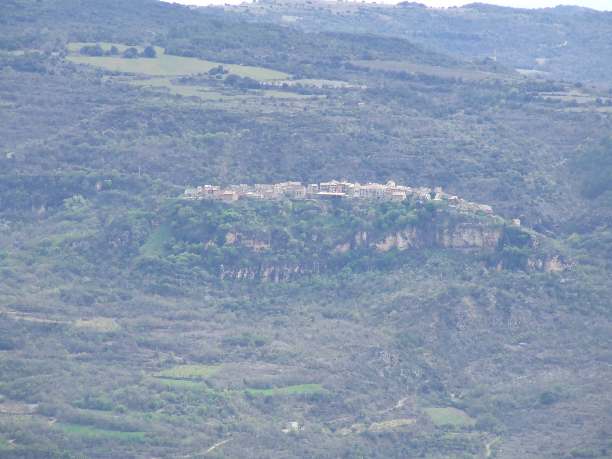 La vila de Llimiana, dalt del seu turó (Pallars Jussà)